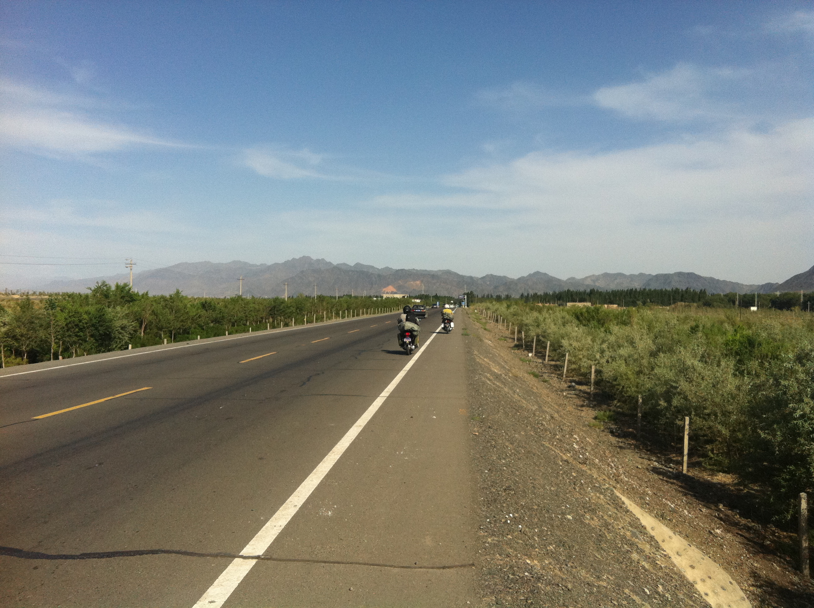 Highway G312 Xinjiang, China